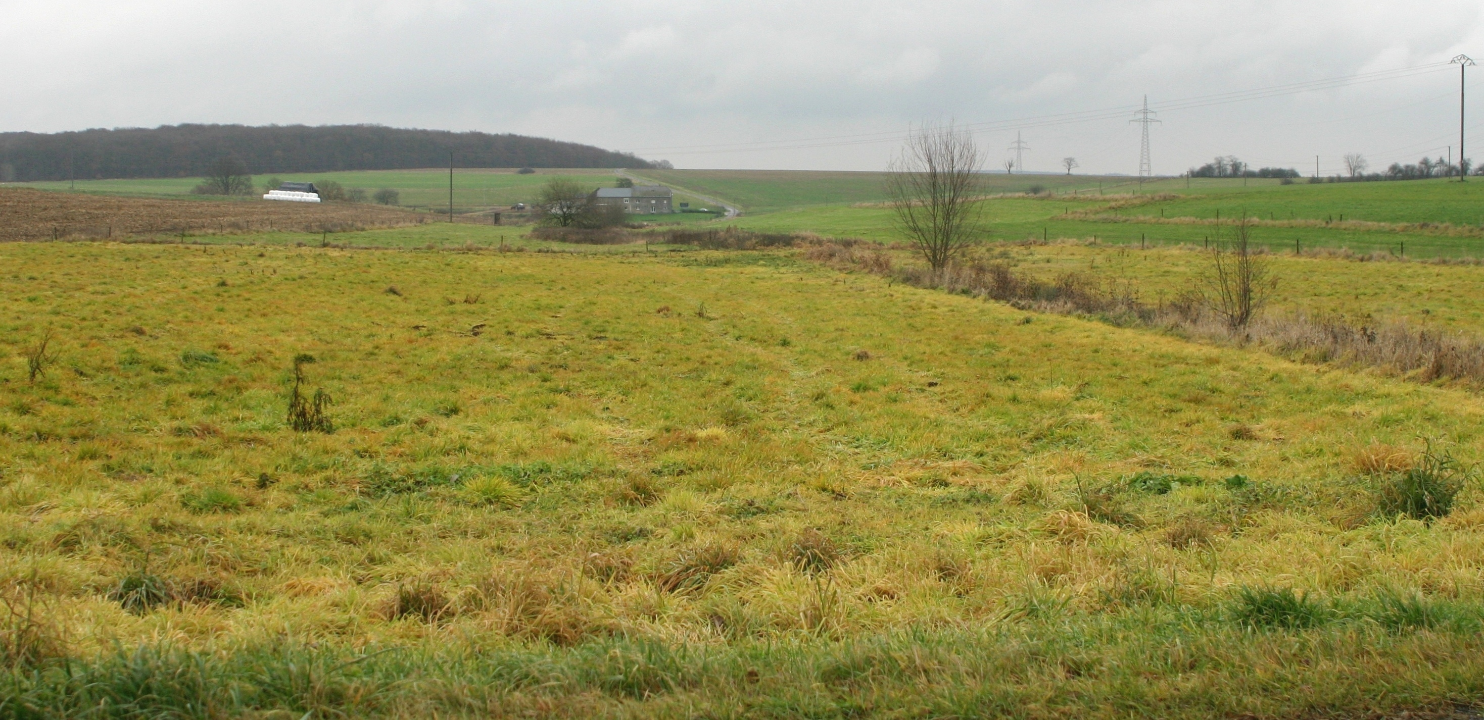 Quellgebitt vun der Halerbaach, den 23.11.2007. Hannen am Bild de Kelleschhaff.